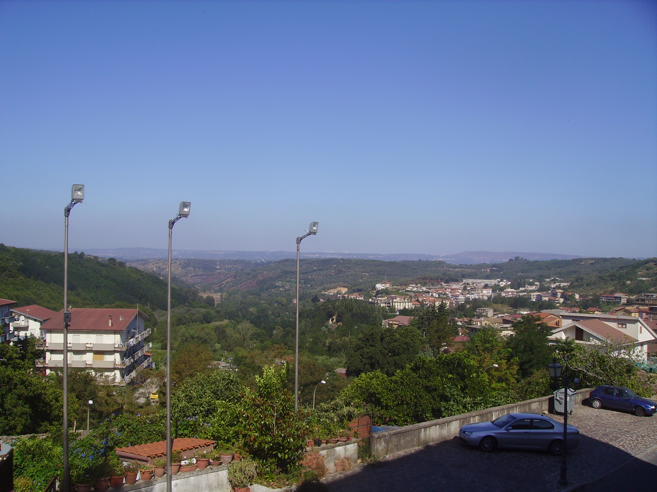 Panorama da Soriano Calabro (VV)